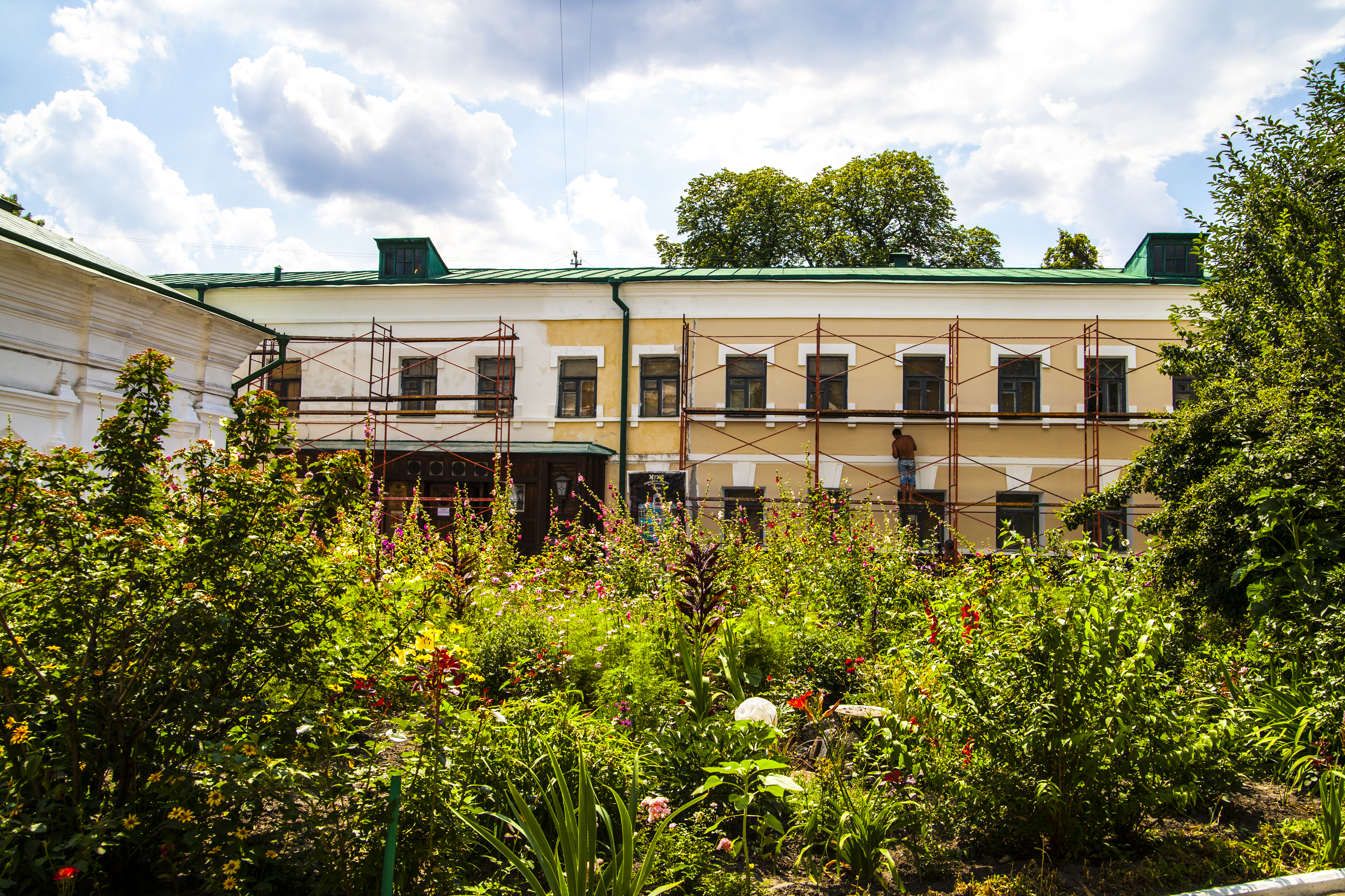 1841—1842; 1859—1860 рр.